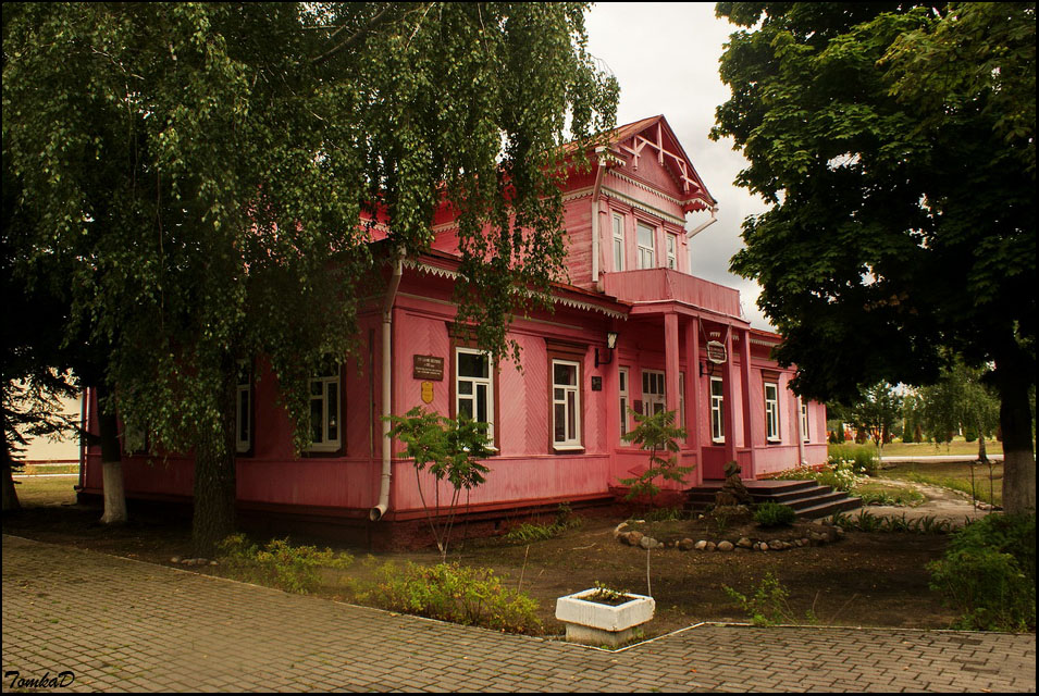 Нароўля. Будынак былога жылога дома (ХIХ стагоддзе), ў якім цяпер размяшчаецца Нараўлянскі гісторыка-этнаграфічны музей. вул.Кастрычніцкая, 12 This is a photo of Belarusian heritage monument. Reference number: 313Г000535 ( WLM)